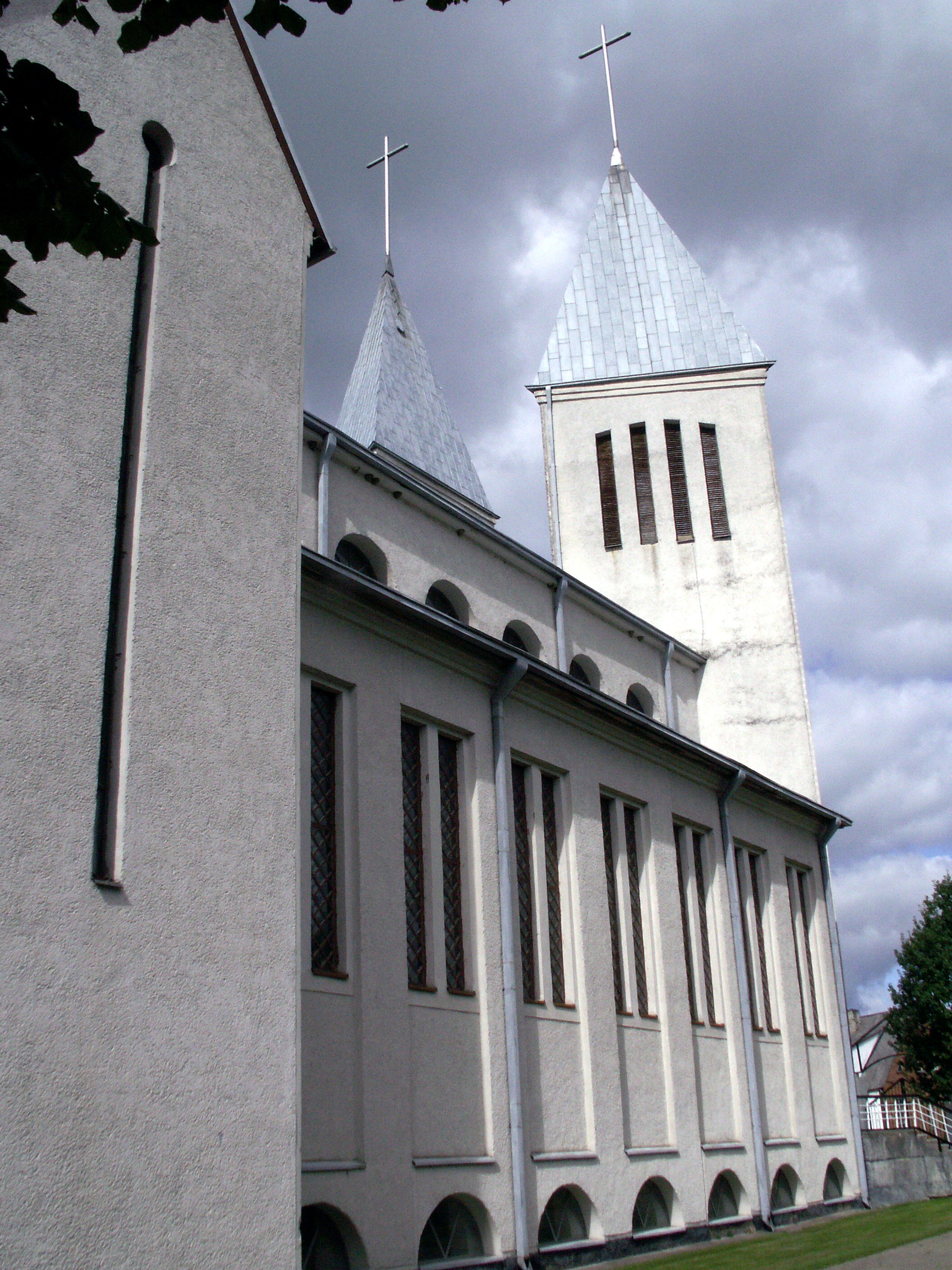 Kaltinėnai, Šilalės rajonas, Lietuva